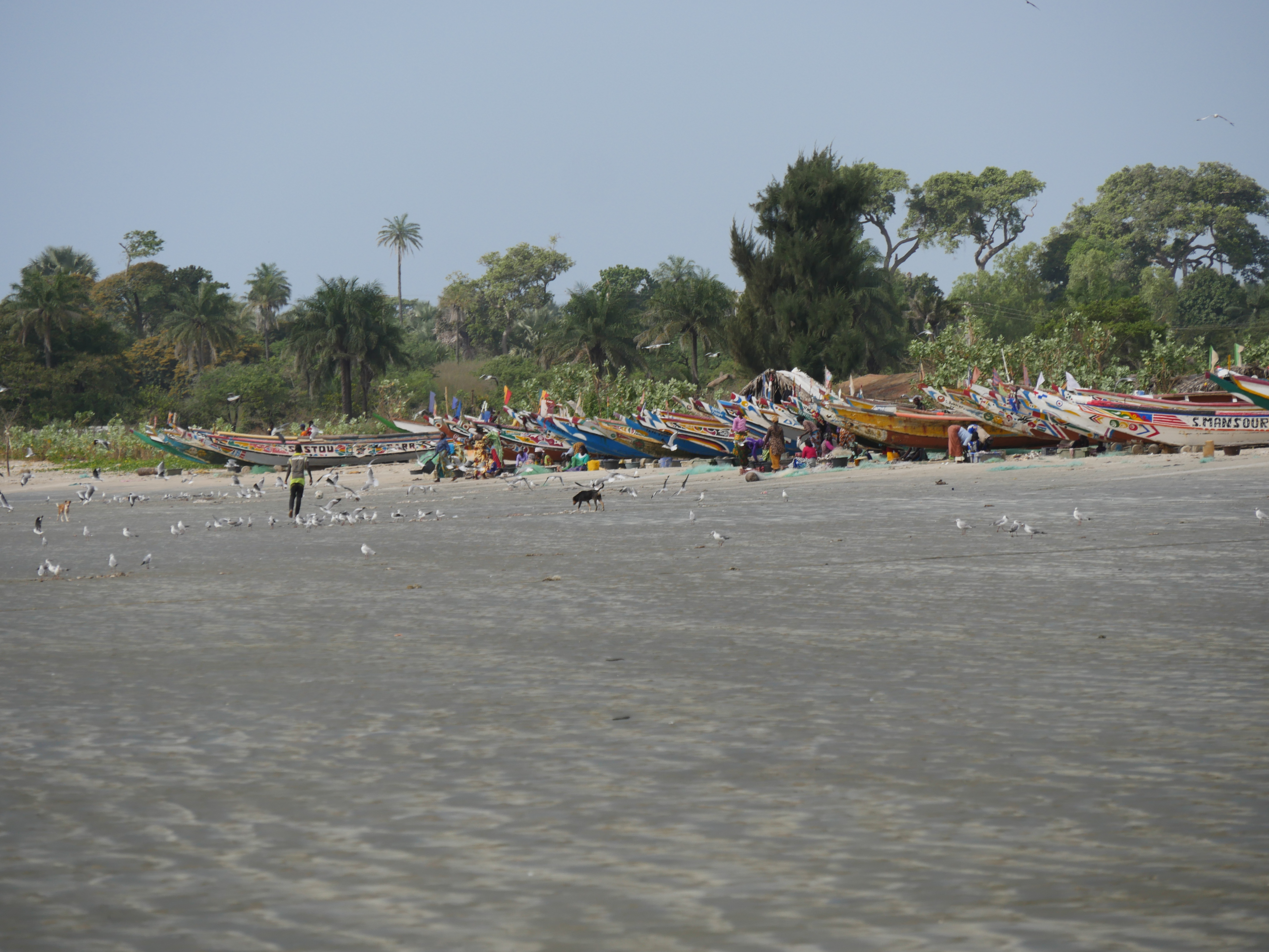 GambiaTanji001